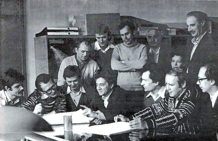 Академик Ю.Д.Прокошкин с сотрудниками своей лаборатории в ИФВЭ